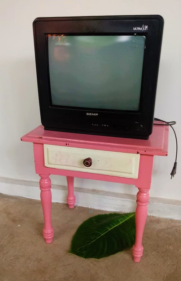 Televisor de 14 polegadas Semp em mesa de canto.